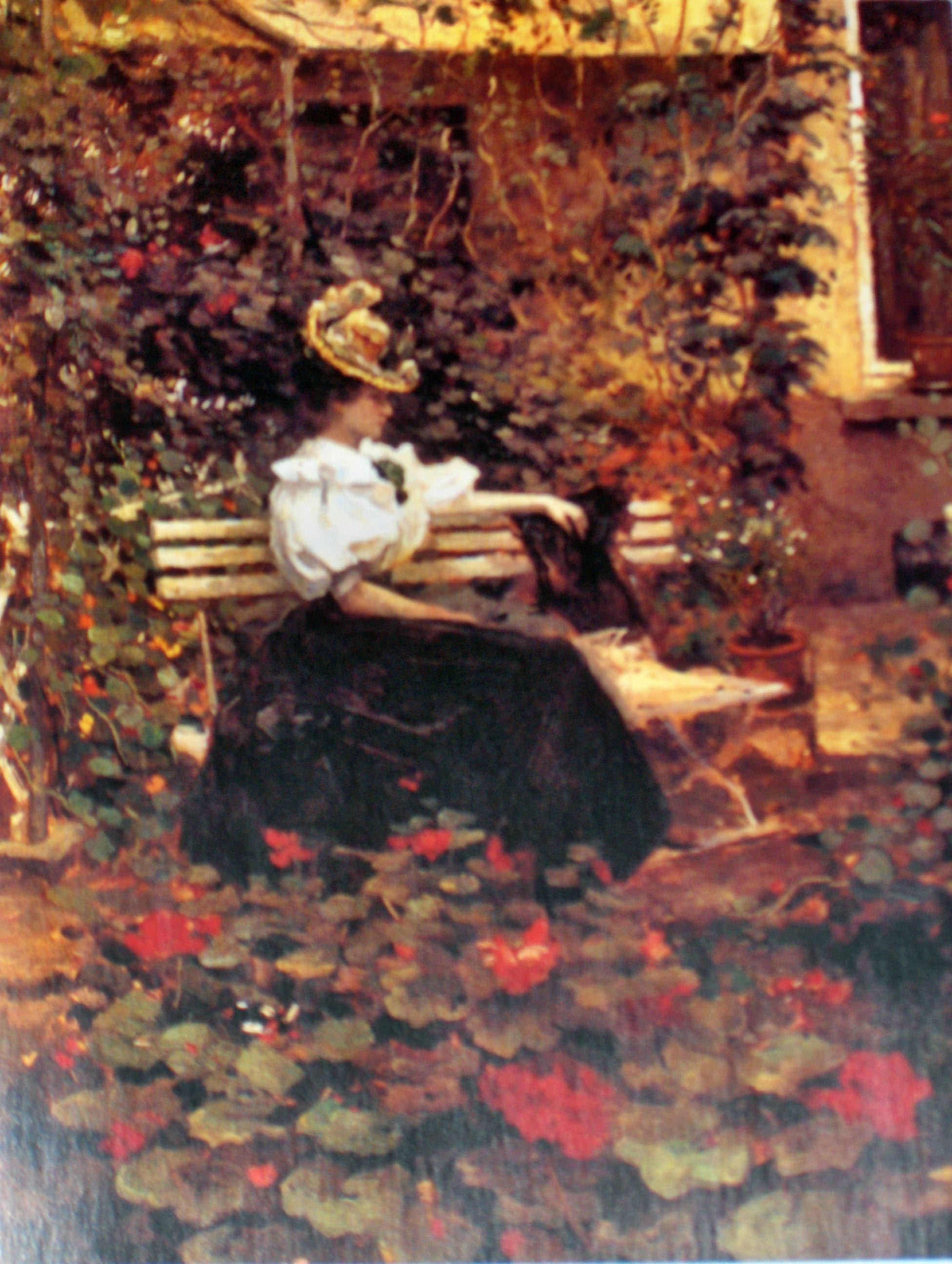 "Echtgenote Ketty Gilsoul-Hoppe op het bebloemde terras " door Victor Gilsoul (1867-1939); privé-bezit